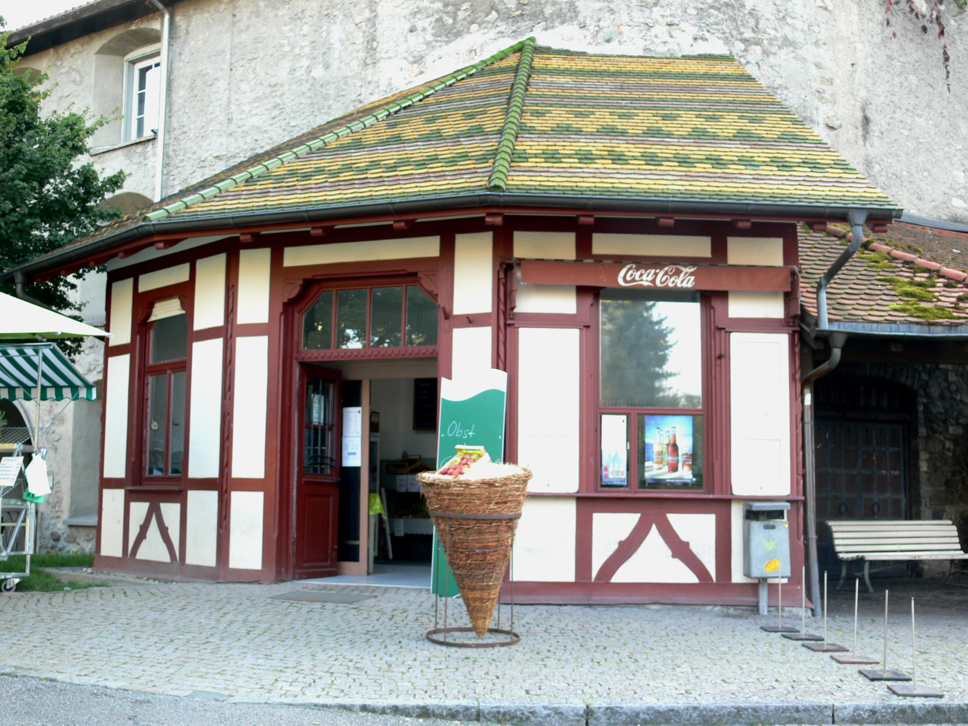 Ravensburg Kiosk am Grünen Turm (erbaut als Haltestelle der Straßenbahn Ravensburg-Weingarten)